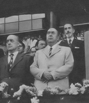 Pablo Neruda en 1972, durante un acto político en el Estadio Nacional de Santiago.